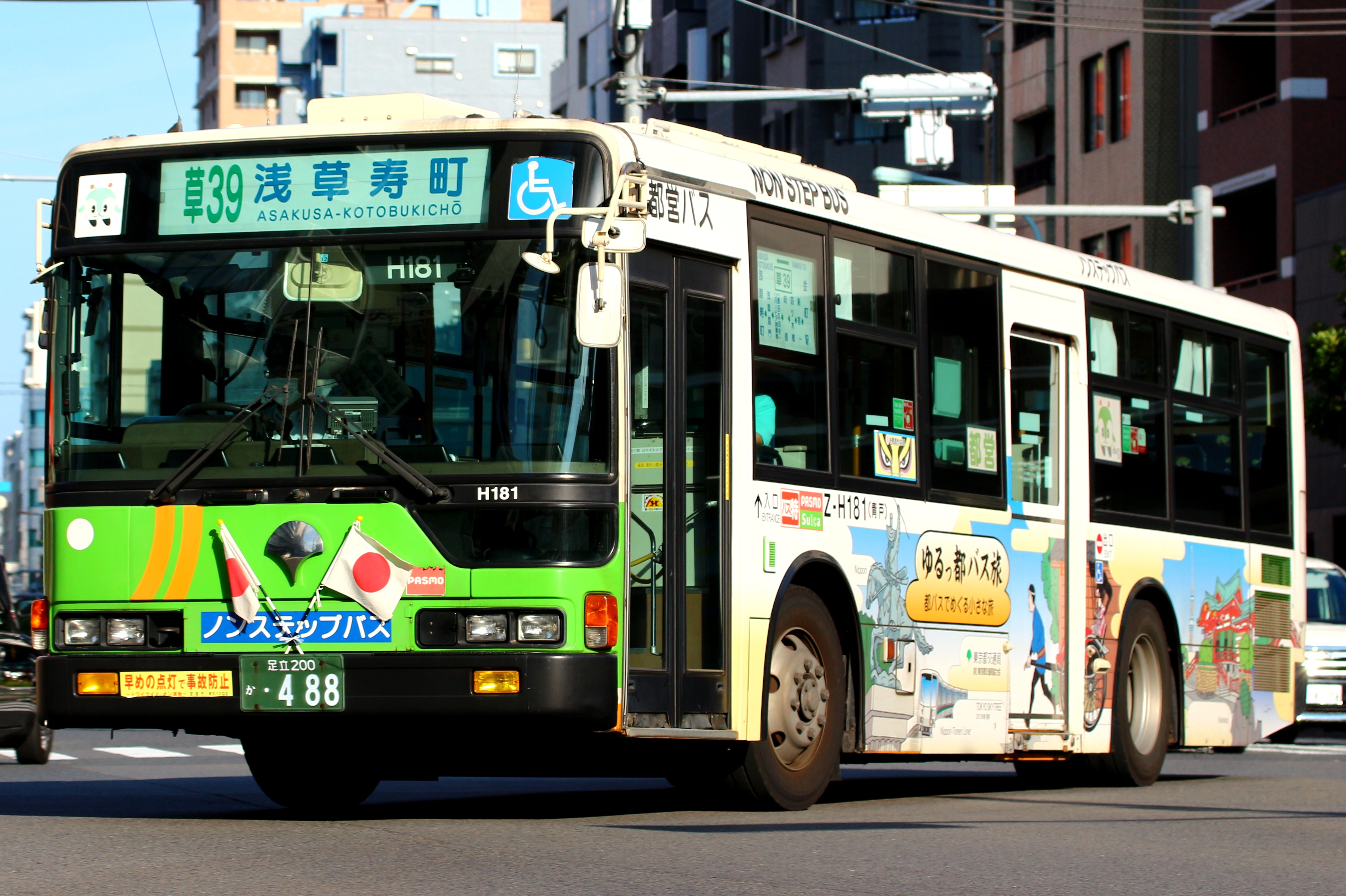 草39系統浅草寿町行き(幕車)